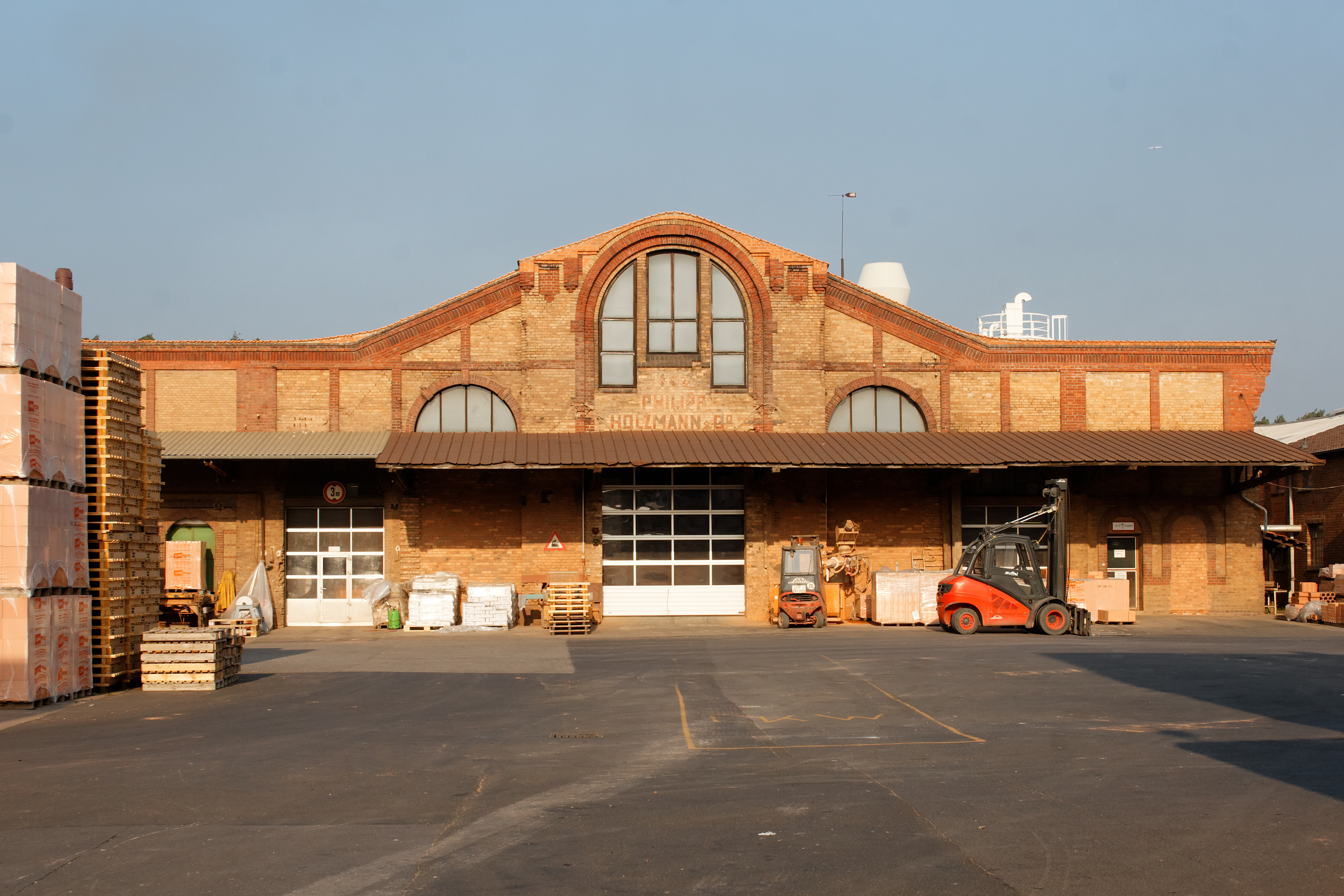 Ziegelwerk in Hainburg (Hessen), Ortsteil Hainstadt. Die Halle mit Fassade aus zweifarbigem Ziegelmauerwerk wurde 1887 von der Firma Philipp Holzmann errichtet. Unter den Rundbogenfenstern des Drreiecksgiebels sind noch Firmenname und Jahreszahl zu erkennen. Die Halle ist eines der wenigen erhaltenen Beispiele früher Industriearchitektur im Kreis Offenbach. Sie wird nach wie vor als Teil eines Ziegelwerks genutzt. Bemerkenswert aus Sicht des Denkmalschutzes ist die Dachkonstruktion aus weit gespannten Holzbogenträgern mit Unterspannung.